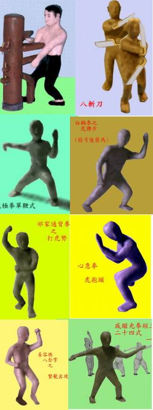 中國武術